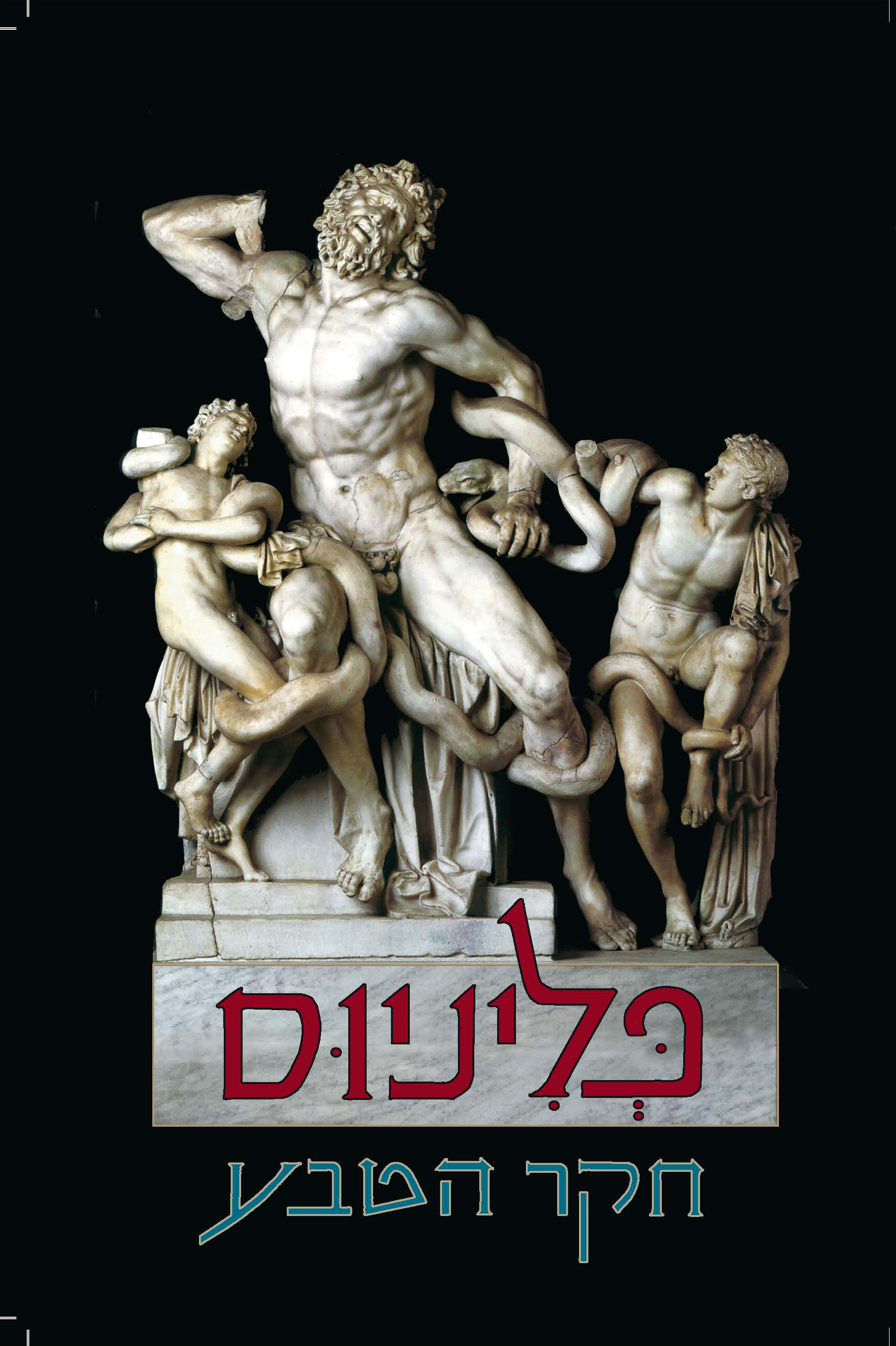 Plinius-Historia naturalis – Cover of book in Hebrew translated by Roni Reich with cover design by Avraham Pladot (Laocoon statue) עטיפת הספר תולדות הטבע של פליניוס הזקן. התרגום לעברית של רוני רייך, עיצוב העטיפה של אברהם פלדות